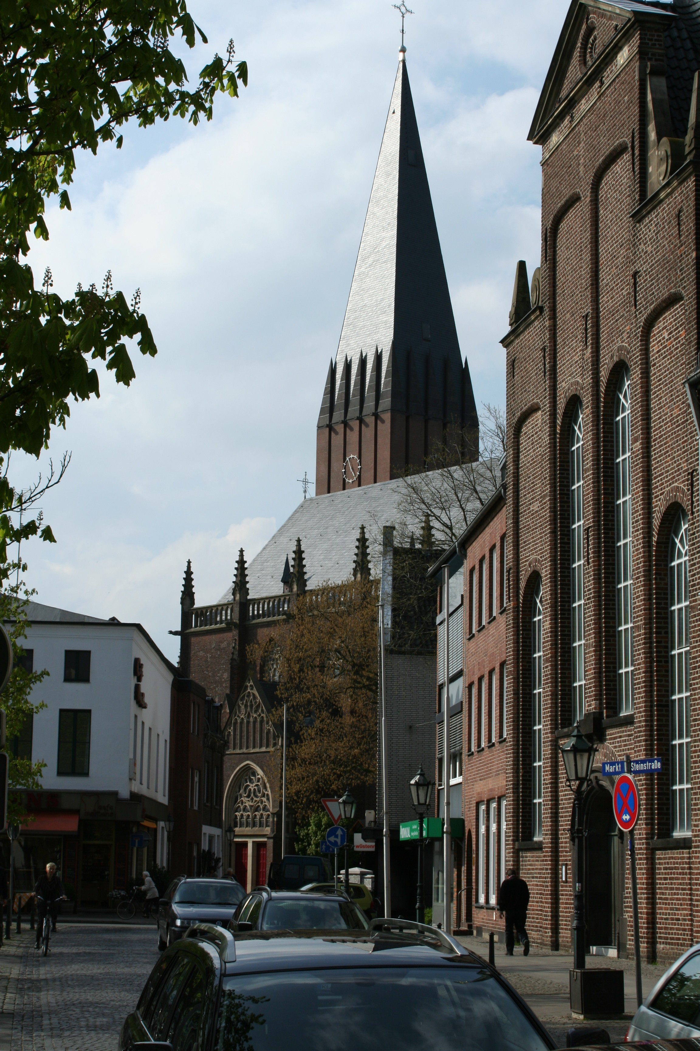 St.Maria ;Magdalena, Goch, NRW, Germany